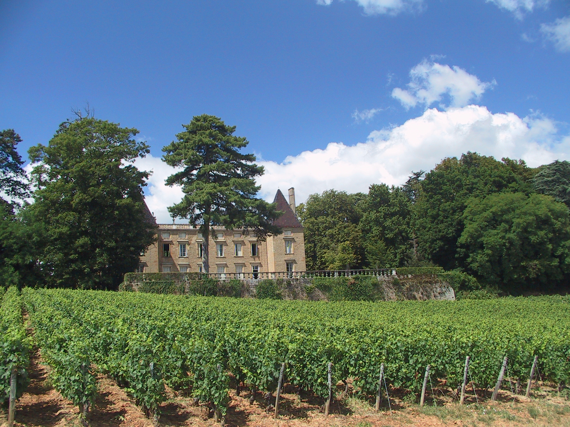 Château de Layé, façade Est